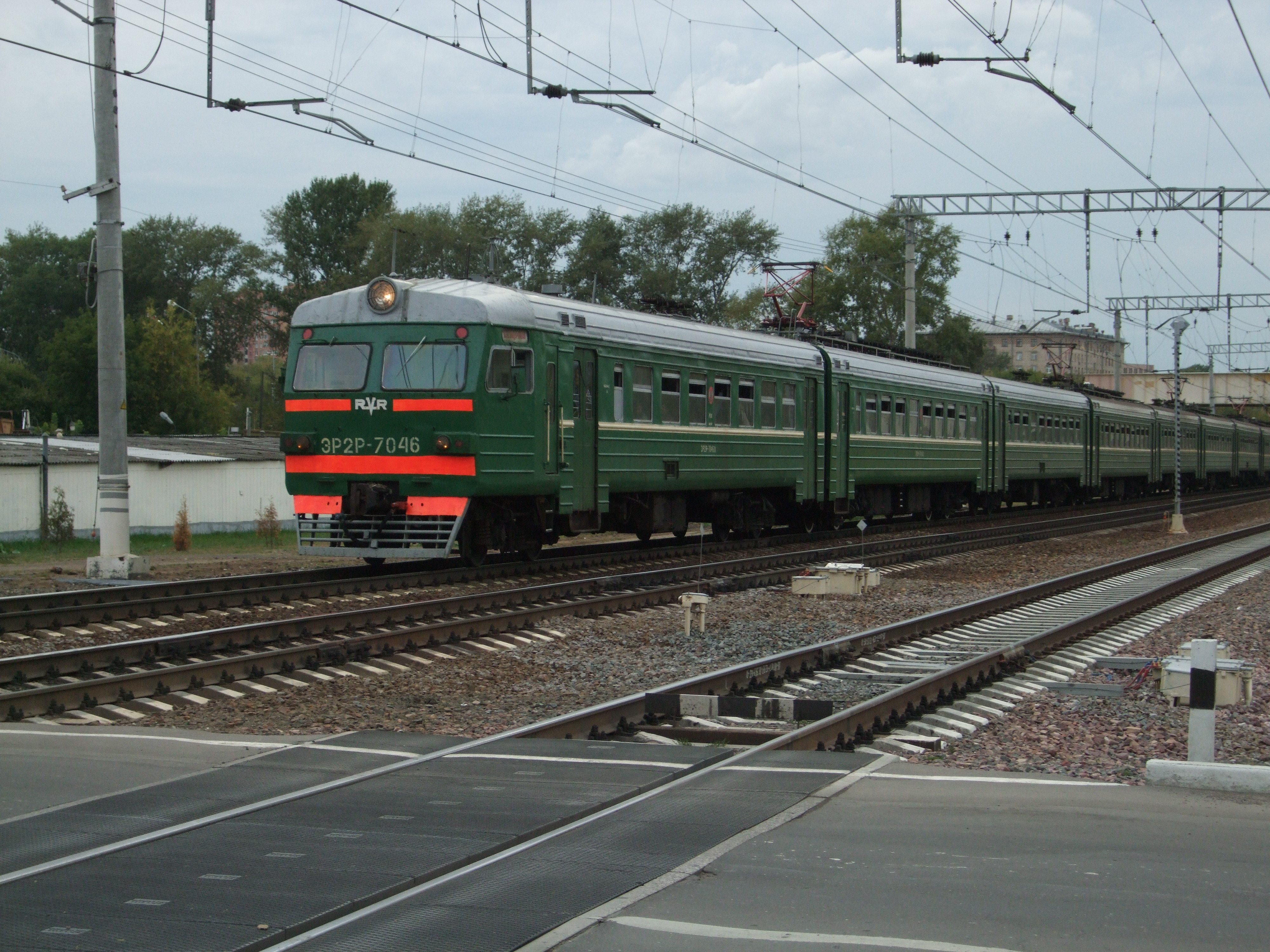 Электропоезд ЭР2Р подъезжает к Карачаровскому переезду в Москве